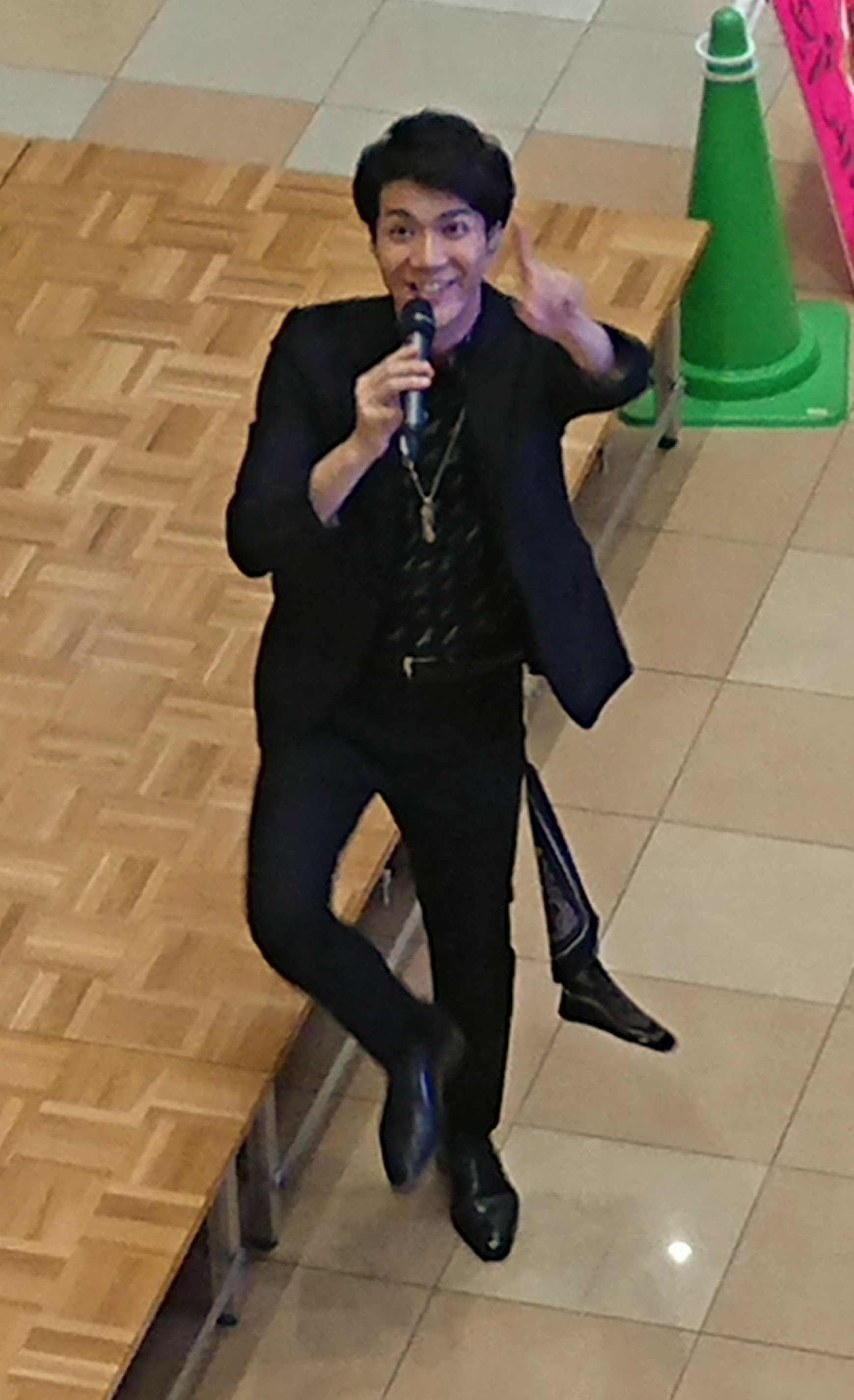 演歌歌手の中澤卓也（長岡市のリバーサイド千秋にて）